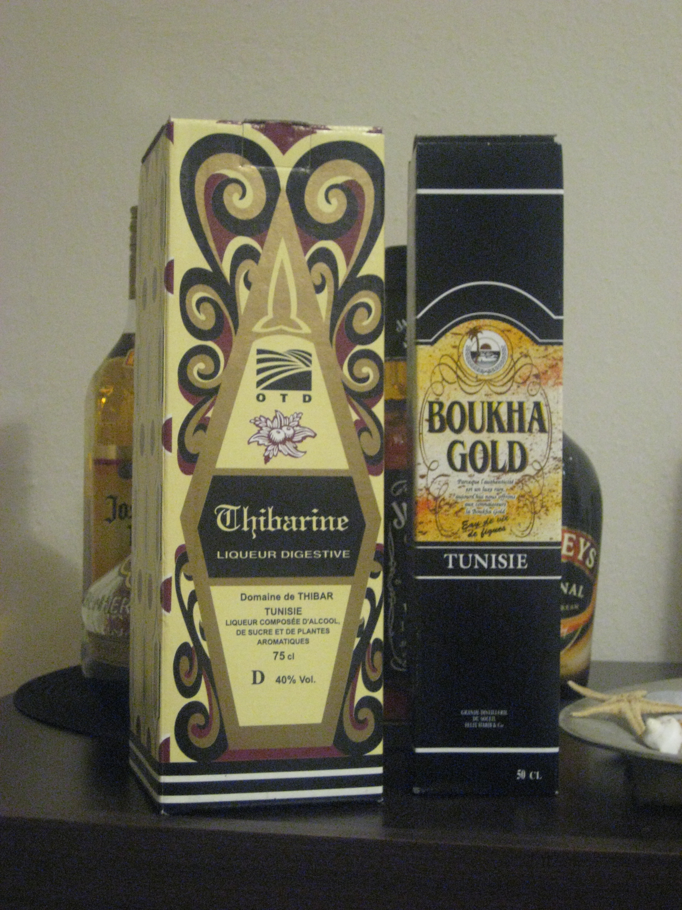 Bouteilles de thibarine et de boukha à Tunis